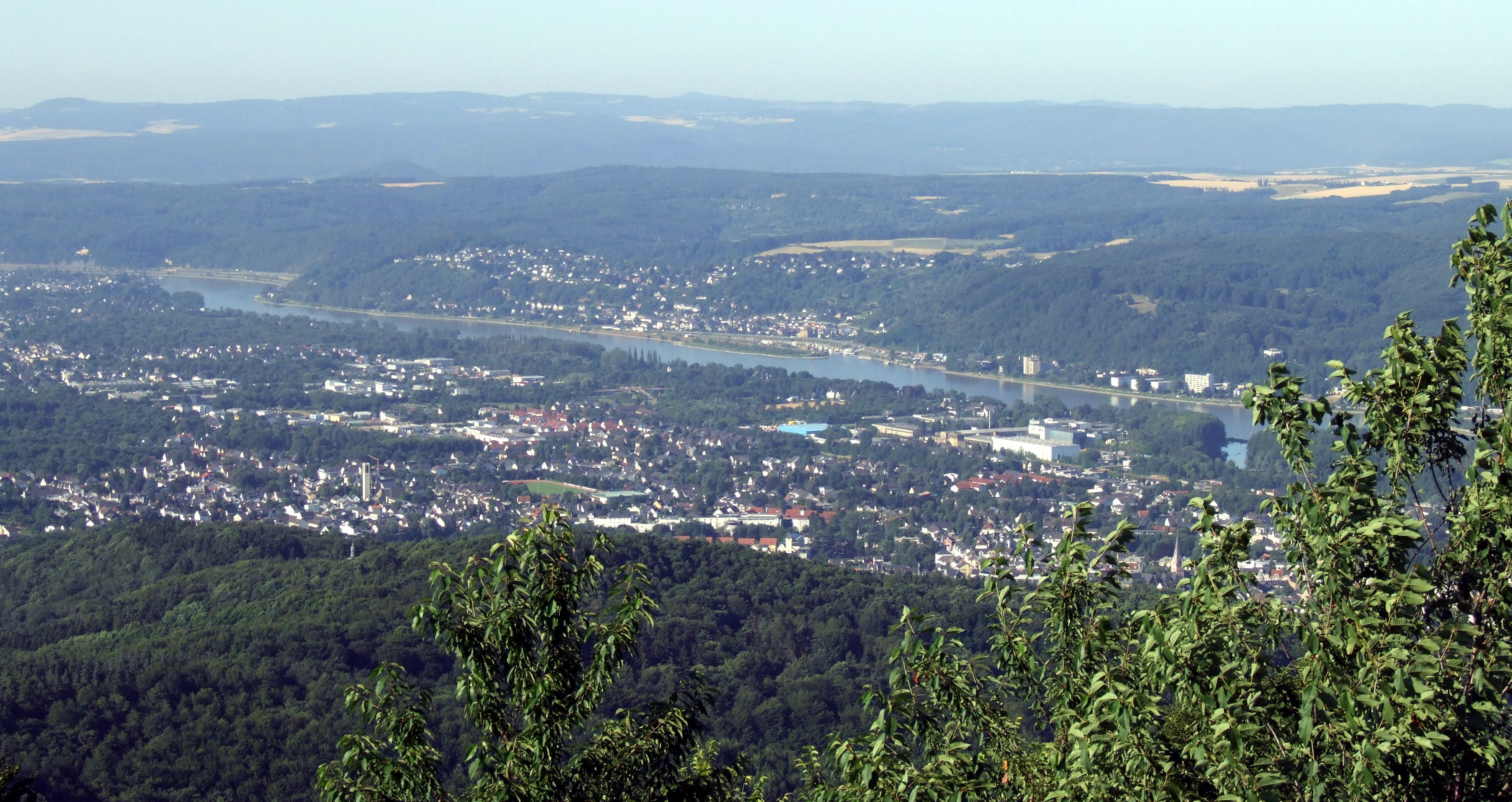 Blick von der Löwenburg auf Rheinbreitbach, Oberwinter, Bad Honnef und Unkel